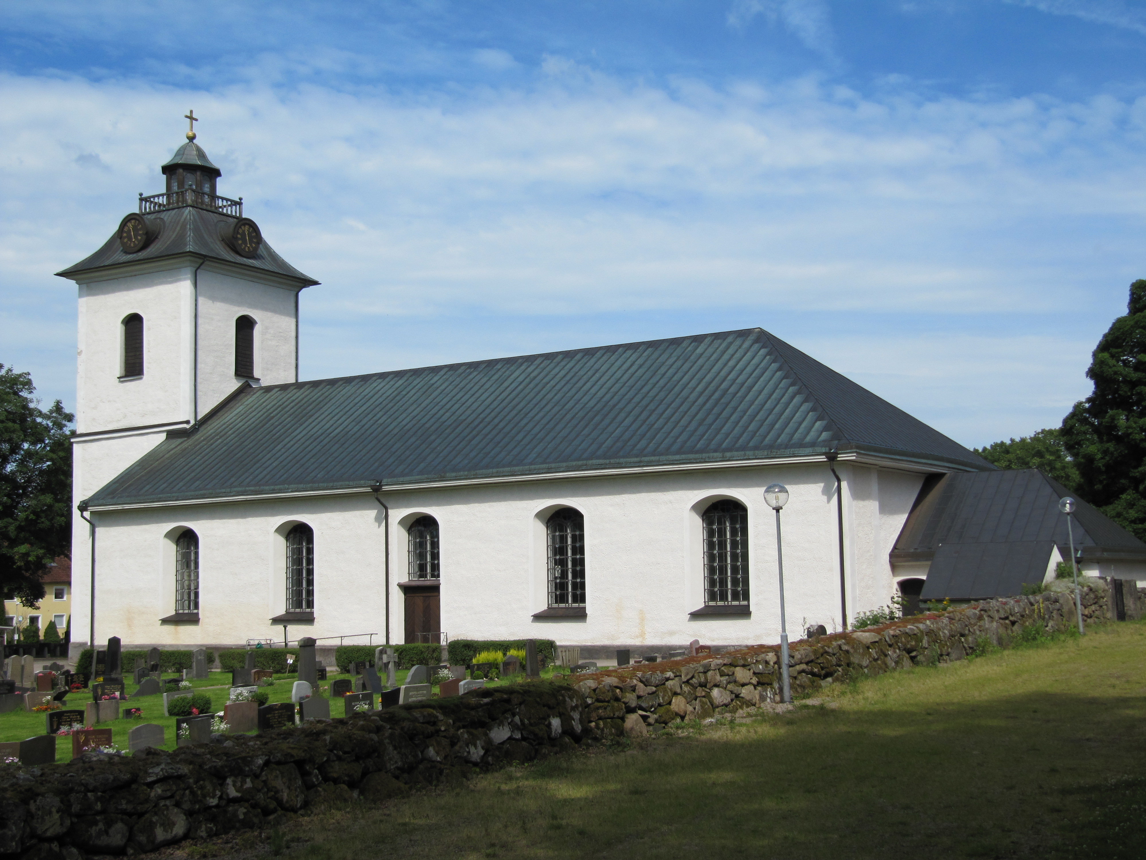 Virestads kyrka